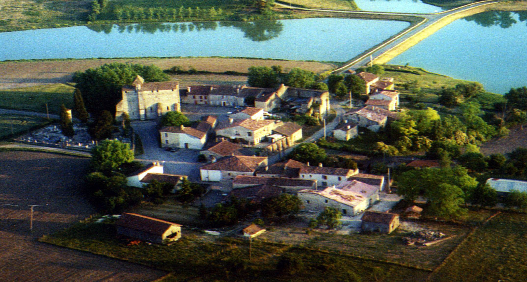 Village de Villeneuve de Mézin vu depuis un ULM